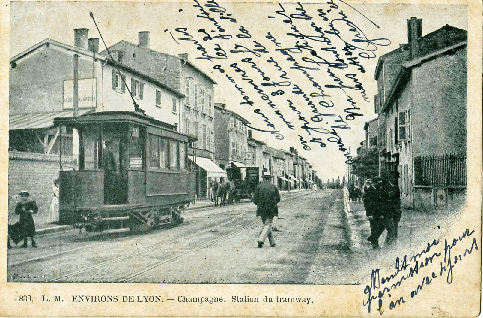 Carte postale ancienne éditée par LM, collection Environs de Lyon, n°839 :CHAMPAGNE - Station du Tramway